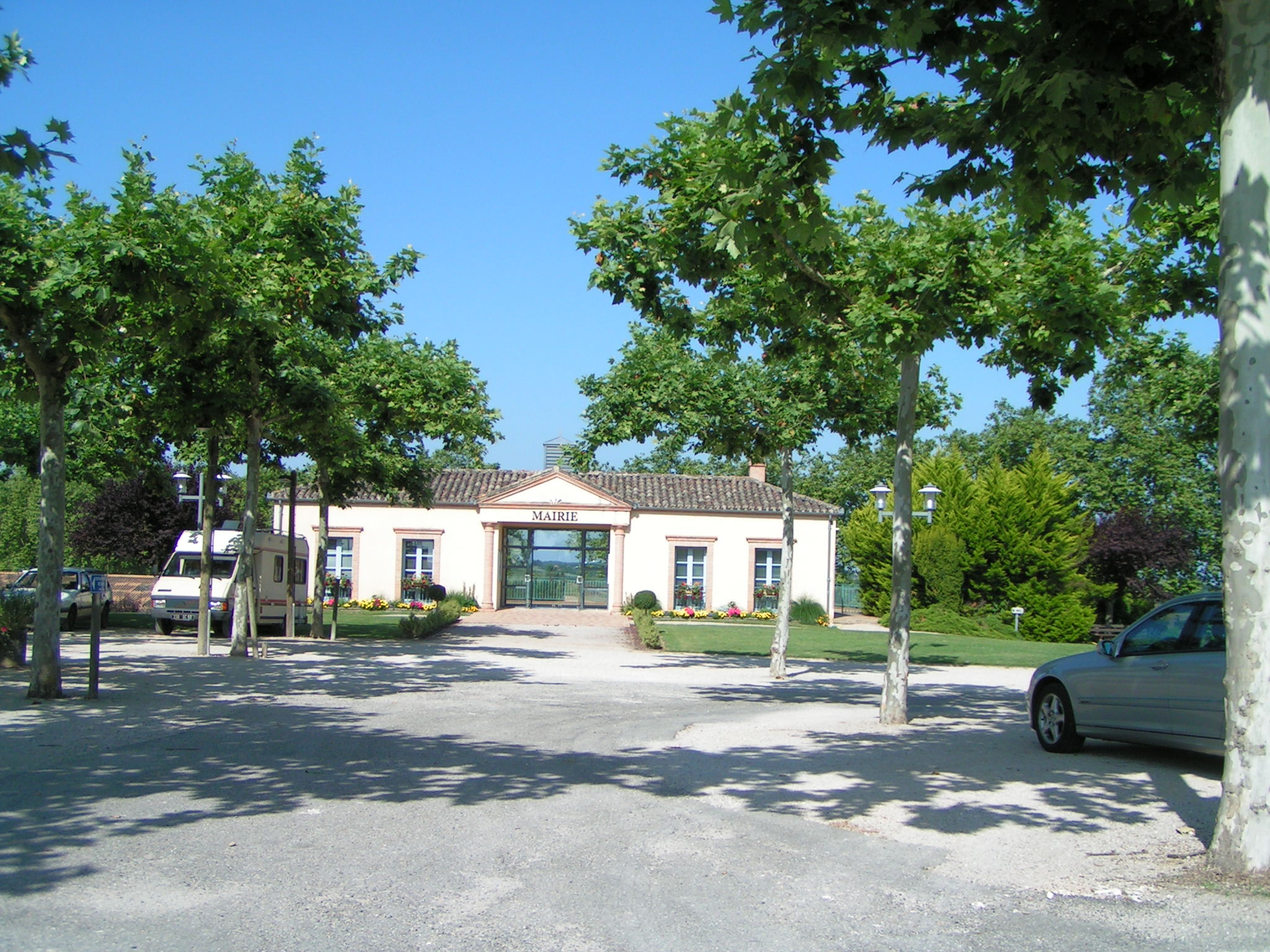 Mairie de Durfort-Lacapelette